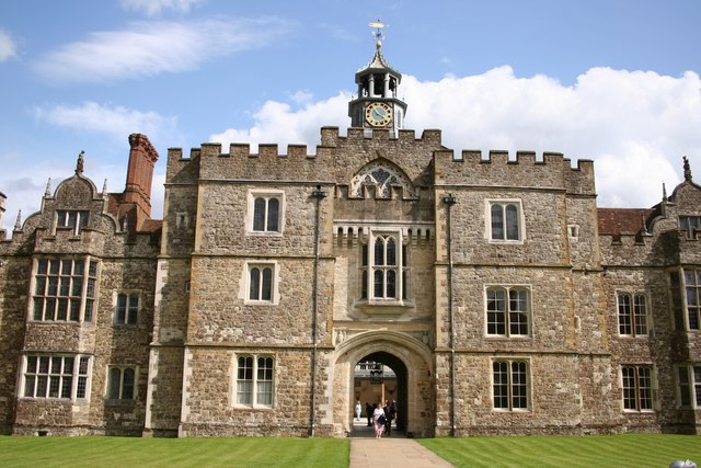 Bourchier's Tower